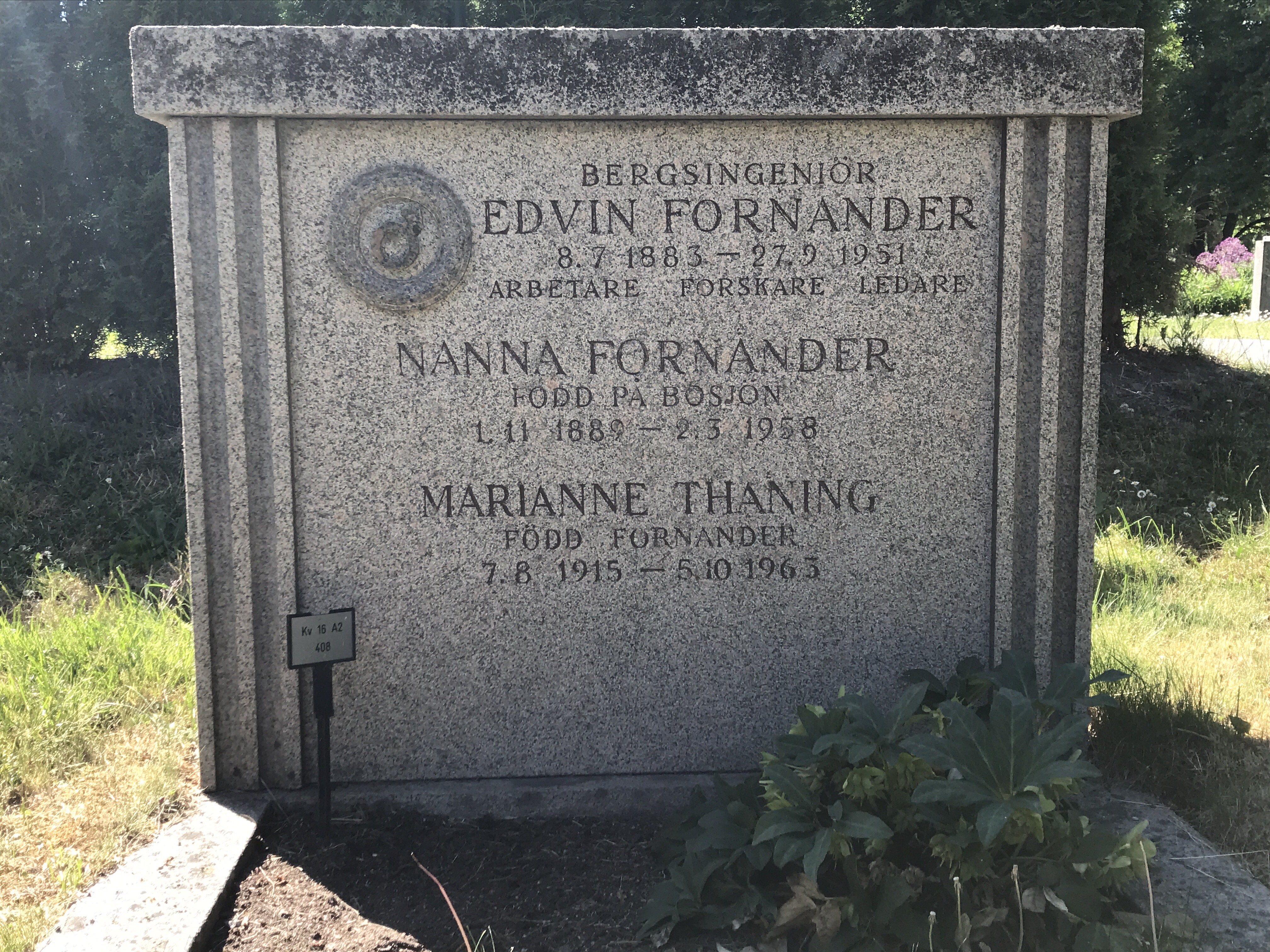 Kv 16 A2 408